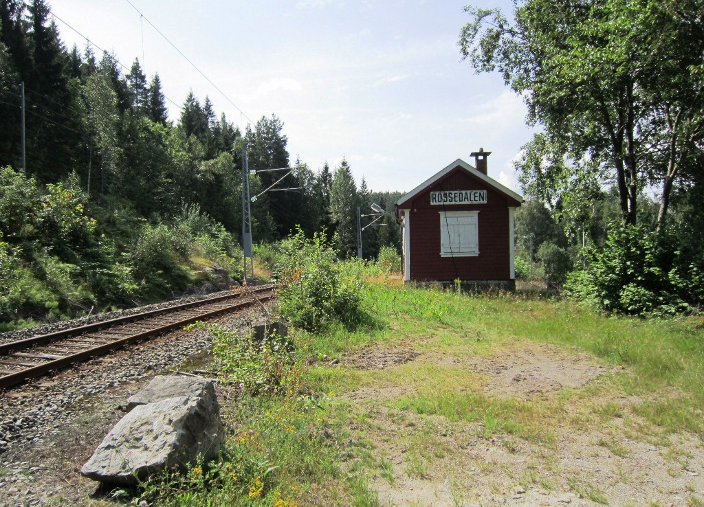 Rossedalen stoppested på Arendalsbanen